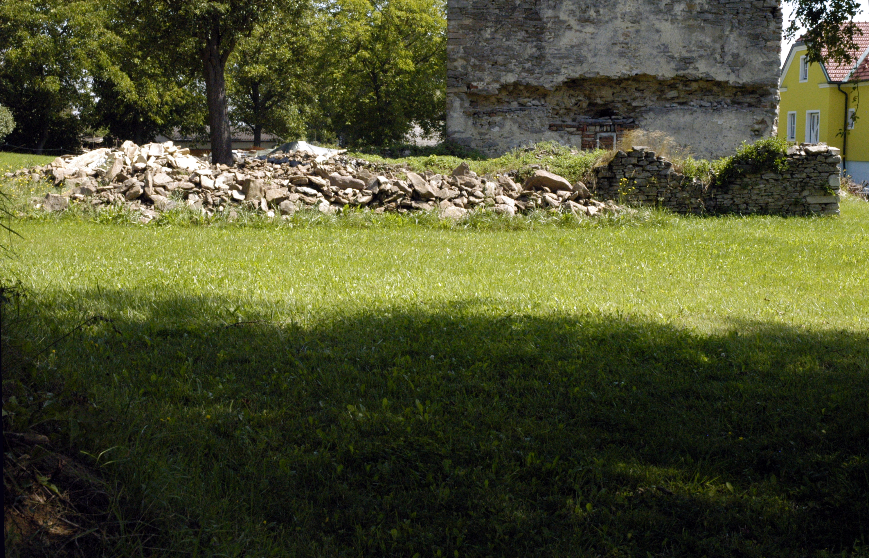 Reste des abgetragenen Turmes der Veste Feinfeld, Gemeinde Röhrenbach